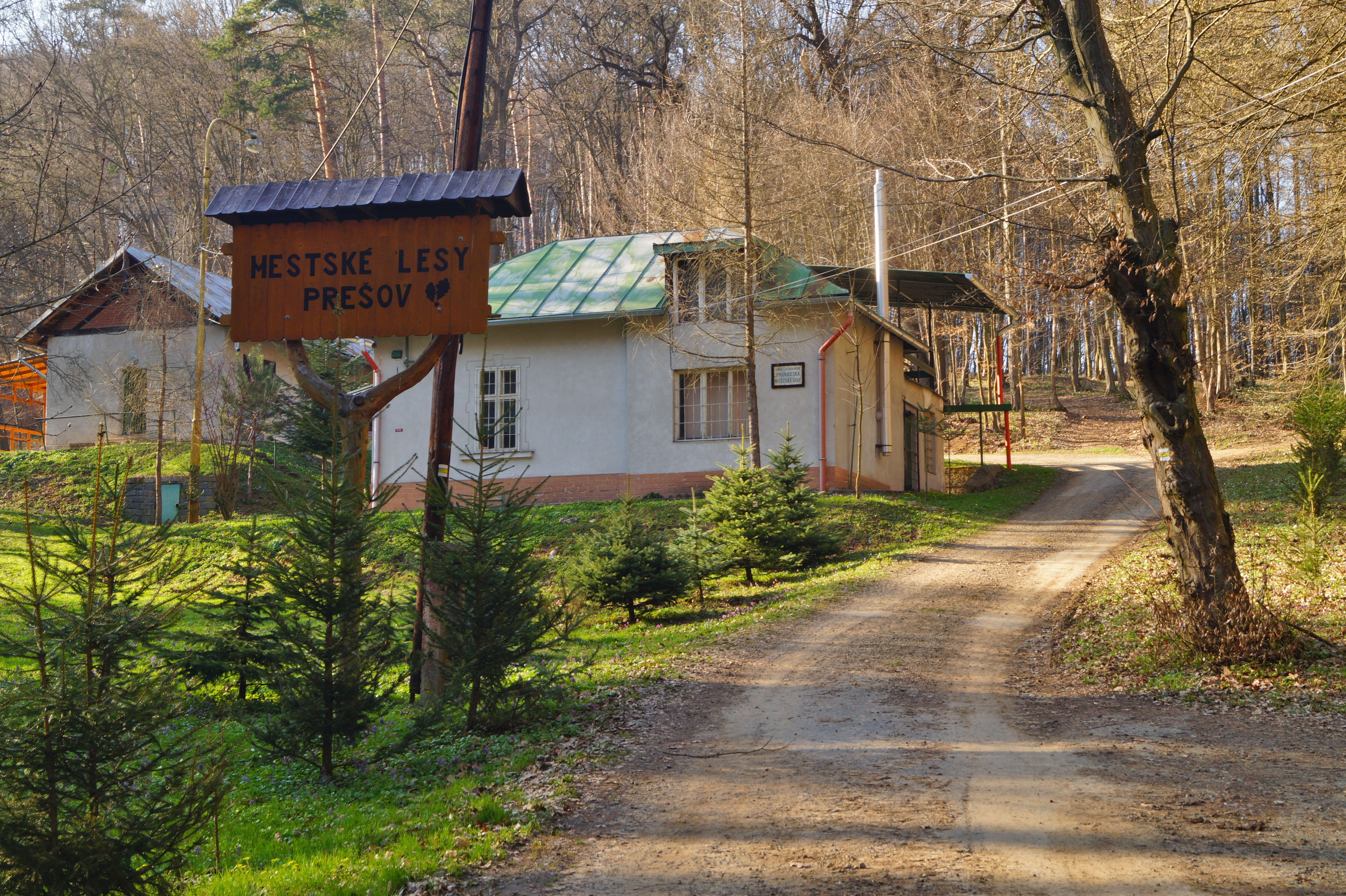 Lesopark Borkút